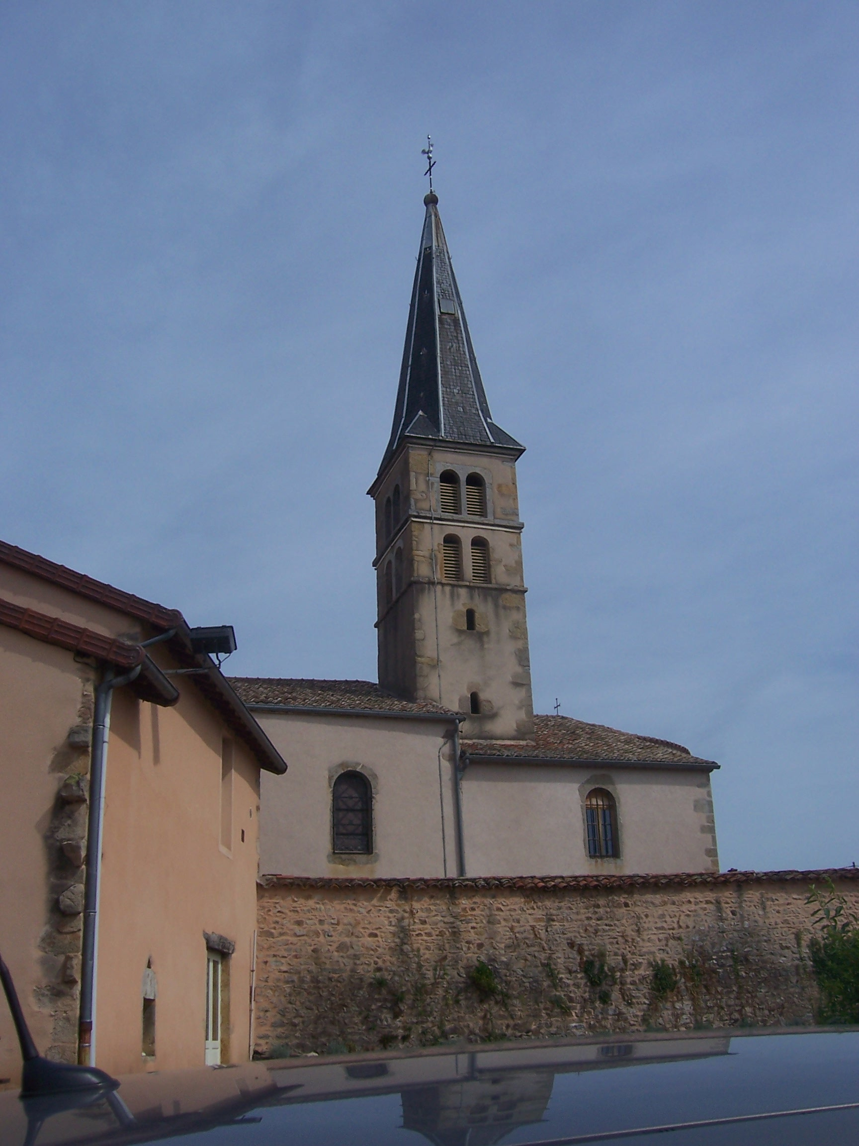 Eglise de Brandon